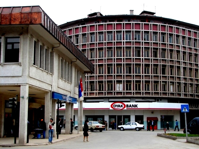 kendi fotom